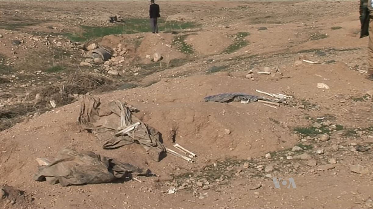 Ossements des victimes yézidies massacrées dans le village de Qinei près de Sinjar. 2015.